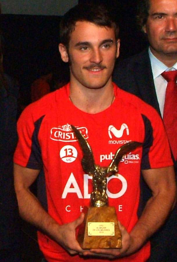 Tomás González Sepúlveda recibe el Cóndor de Oro como el mejor deportista chileno de 2010.